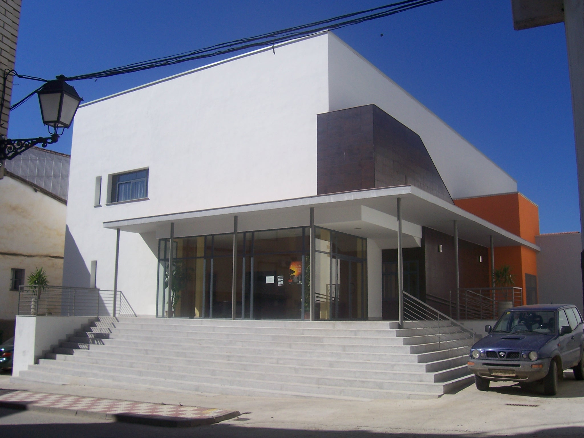 Auditorio del antiguo corral concejo, en Montehermoso, Cáceres, España